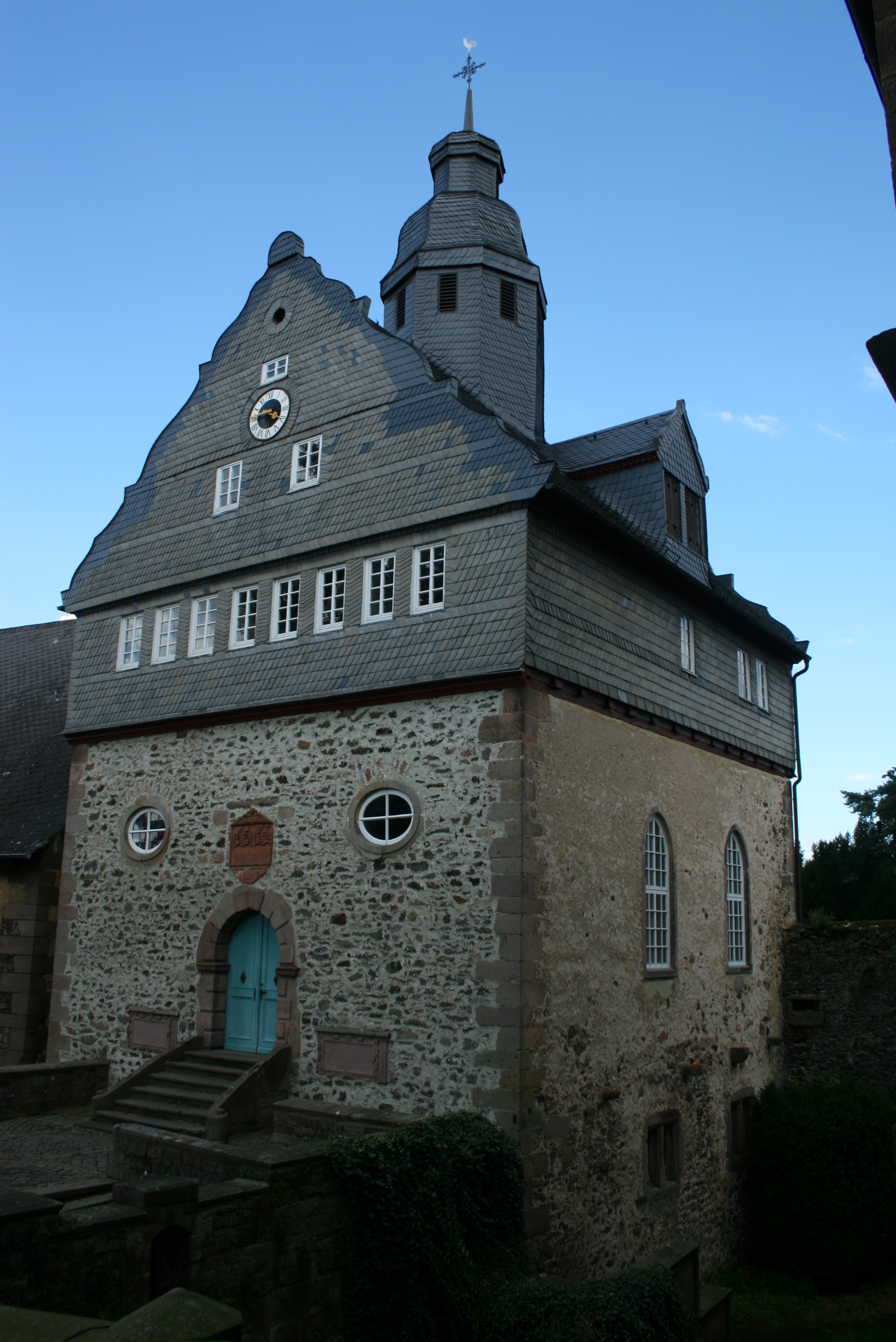 Schloss Eisenbach bei Lauterbach im mittelhessischen Vogelsberg: Kirche